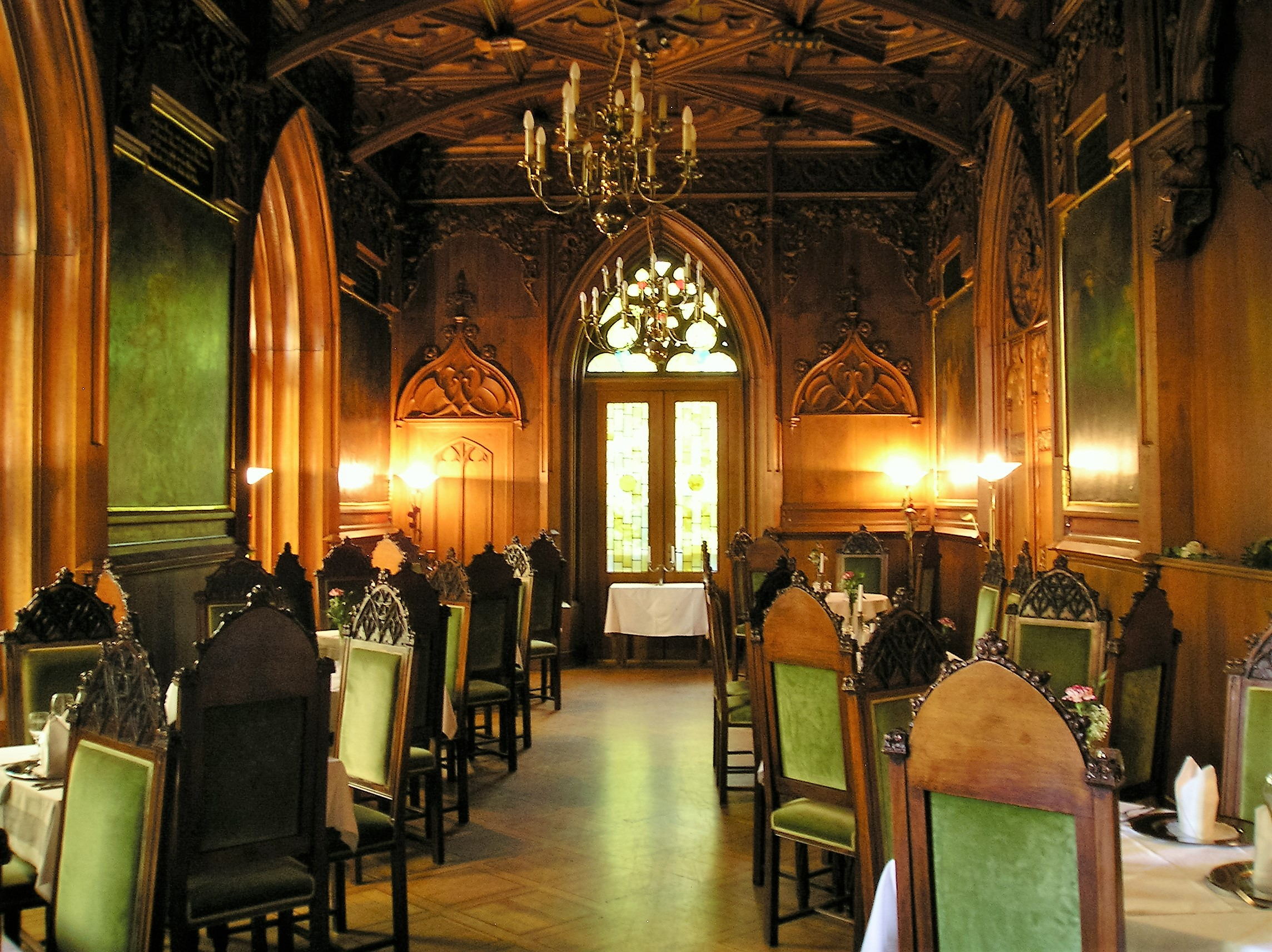 Rittersaal im Schloss Landsberg, Meiningen